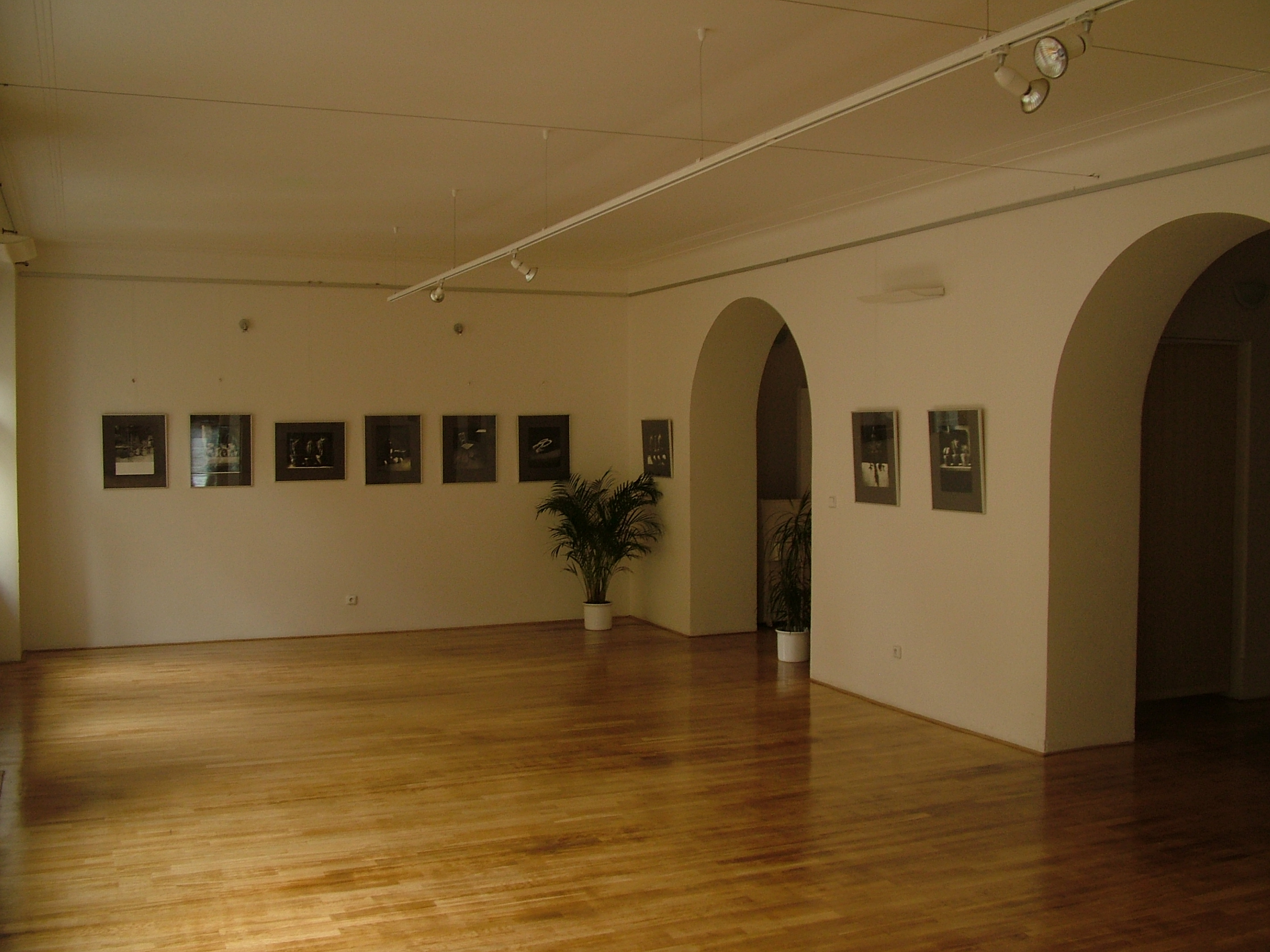 Karel Čapek, výstava fotografií, Galerie Deset, Praha, listopad 2011